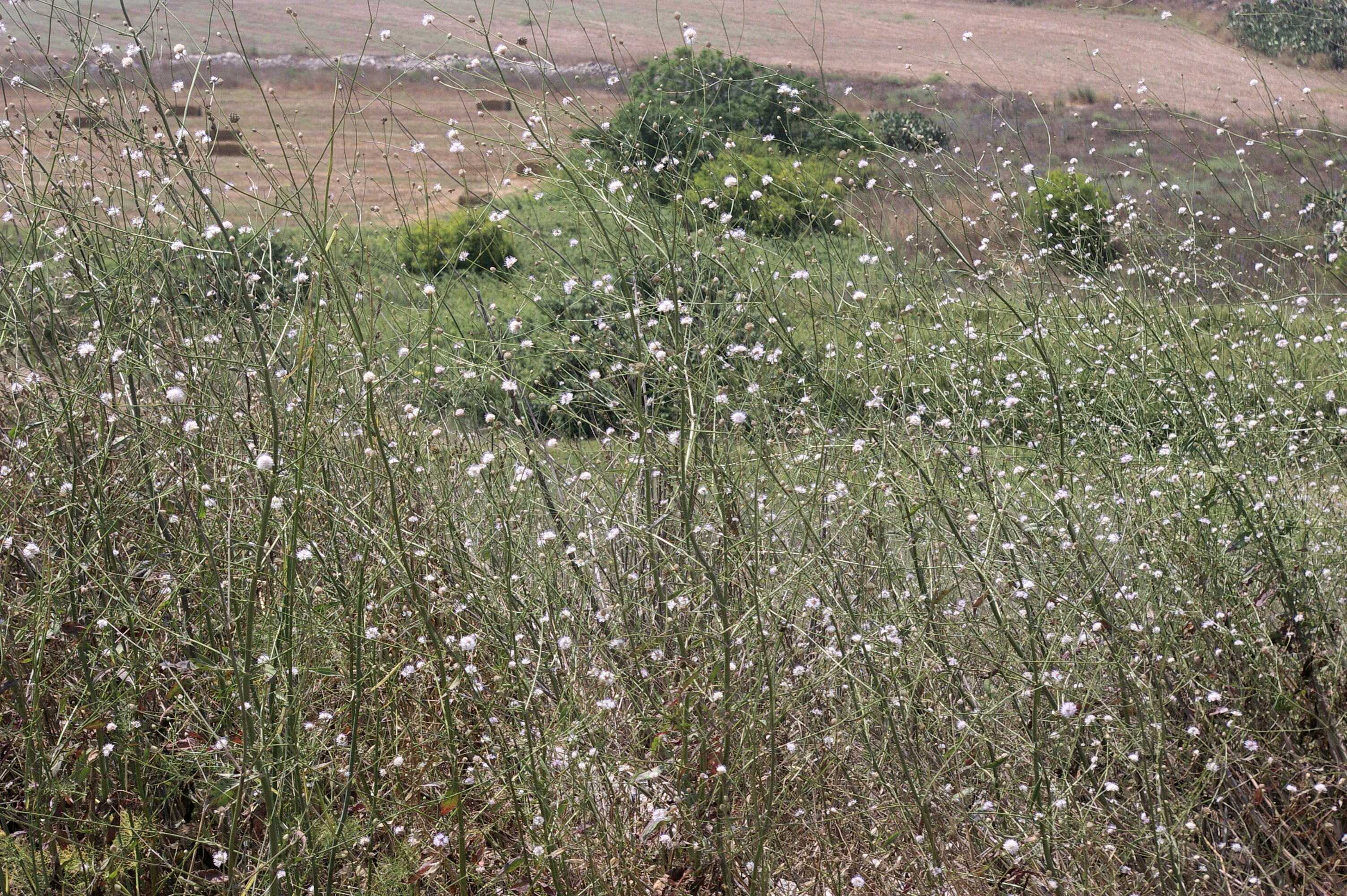 Cephalaria joppensis שלמון יפואי - ליד עין העמק